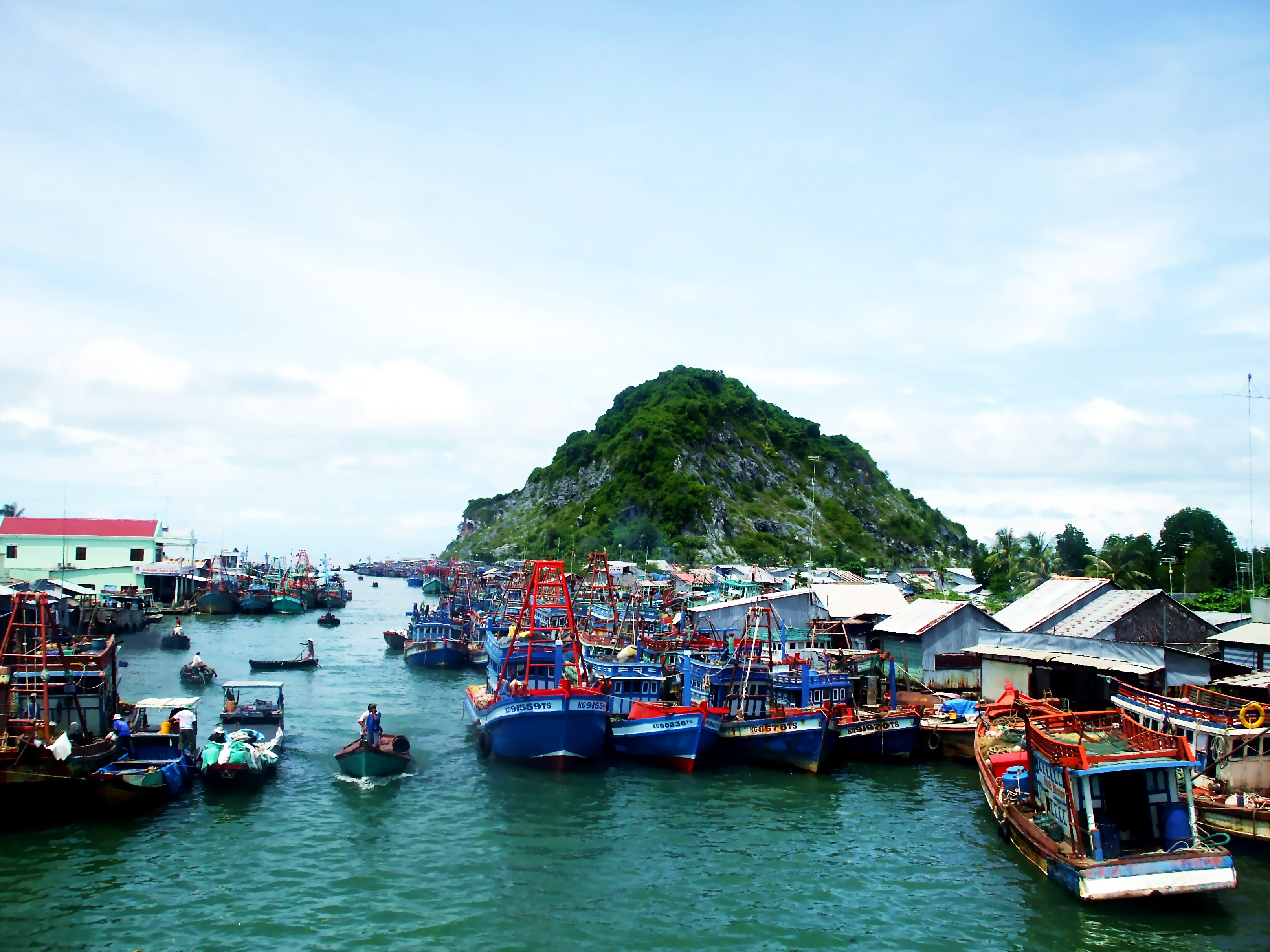 Cảng cá Ba Hòn ở Kiên Lương, Kiên Giang, Việt Nam. Đánh bắt hải sản là một trong những thế mạnh của tỉnh.